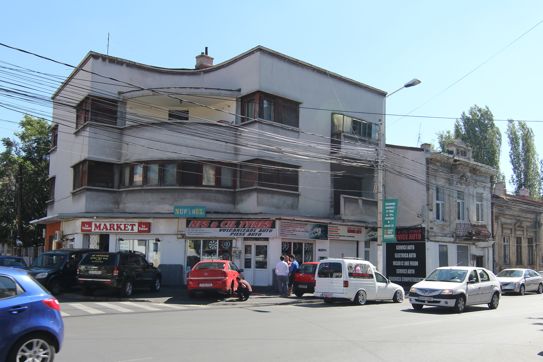 Casă pe strada Traian